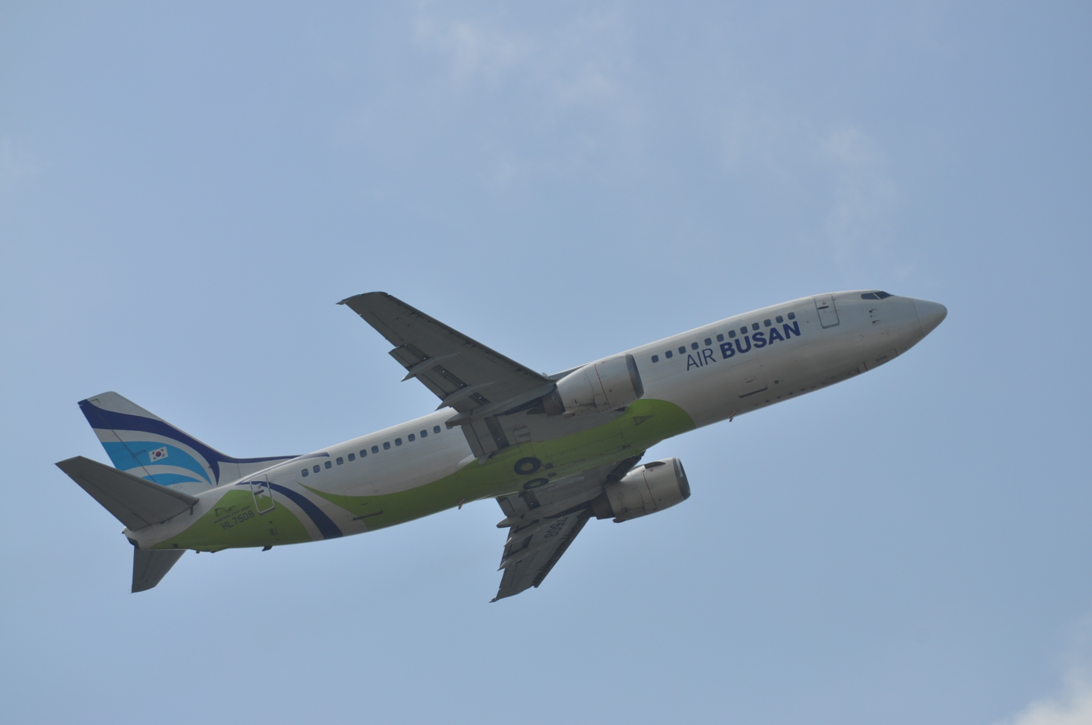 エアプサンのボーイング737-400。福岡空港にて撮影。